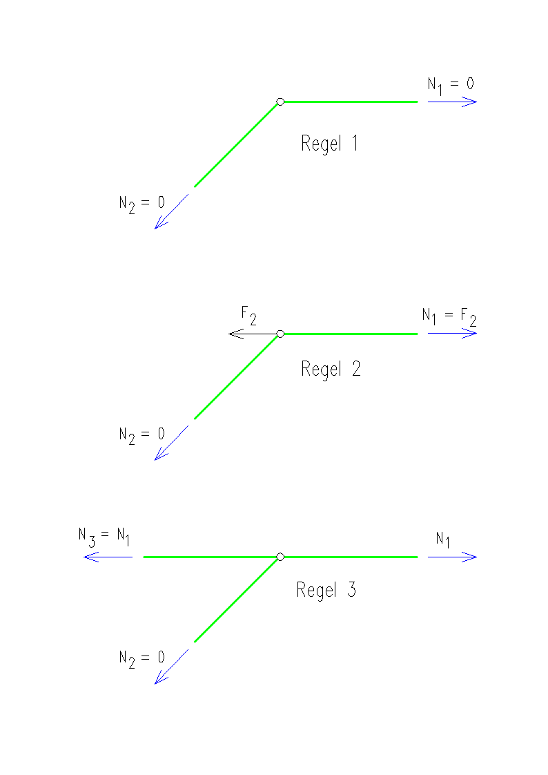 Nullstabregeln im Fachwerk